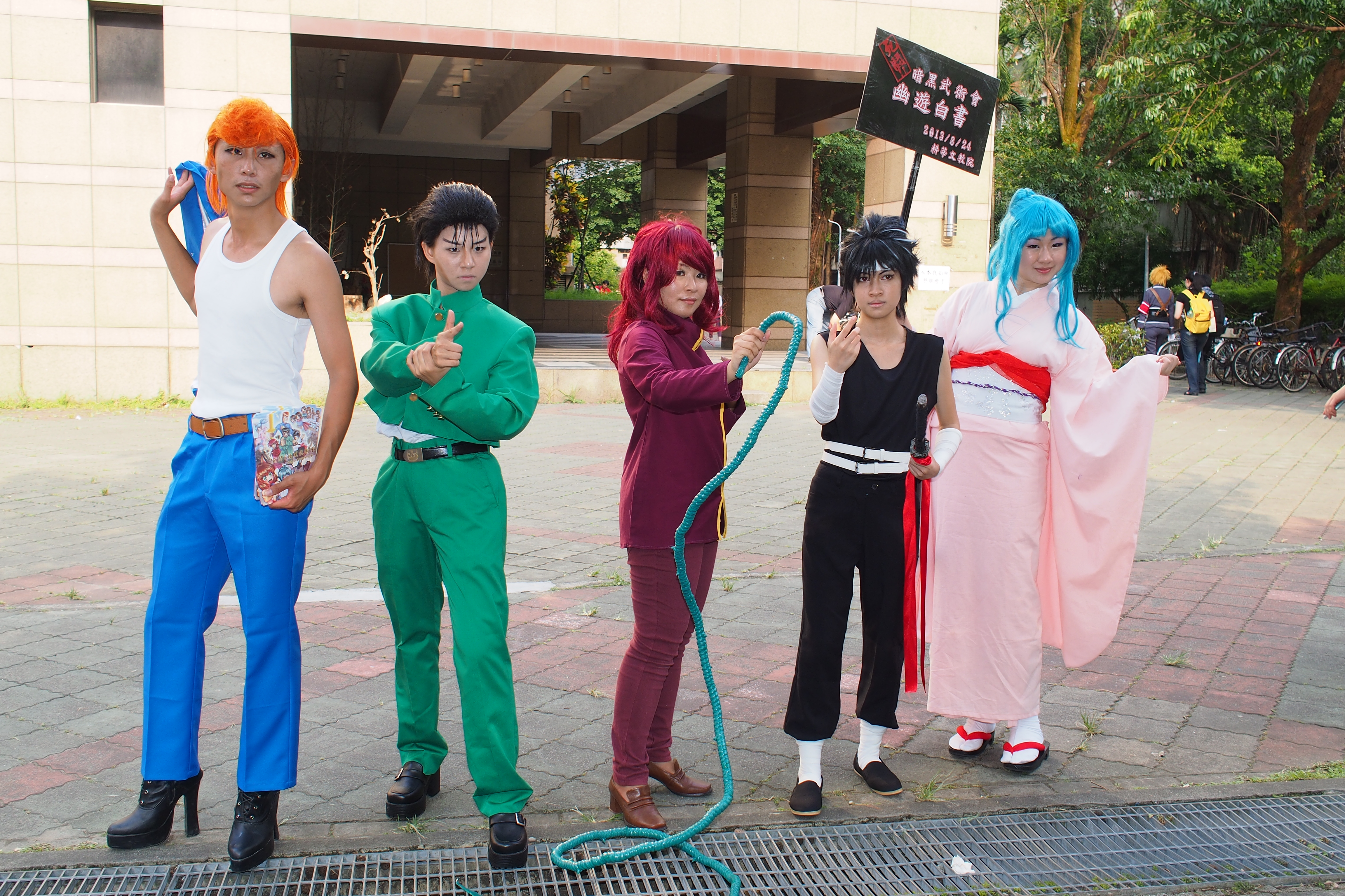 第22屆開拓動漫祭，《幽遊白書》桑原和真、浦飯幽助、藏馬、飛影、牡丹cosplayer。